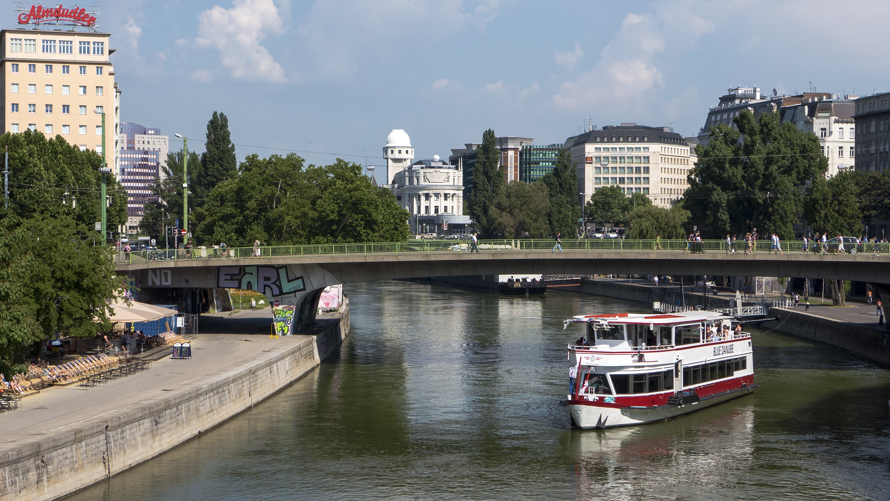 Donaukanal von der Marienbrücke Richtung Osten